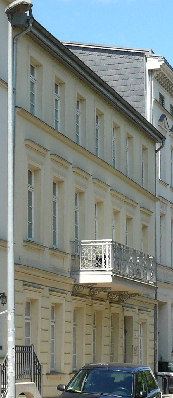 Das denkmalgeschützte Gebäuden "Alexandrinenstraße 3" in Schwerin, Mecklenburg-Vorpommern.